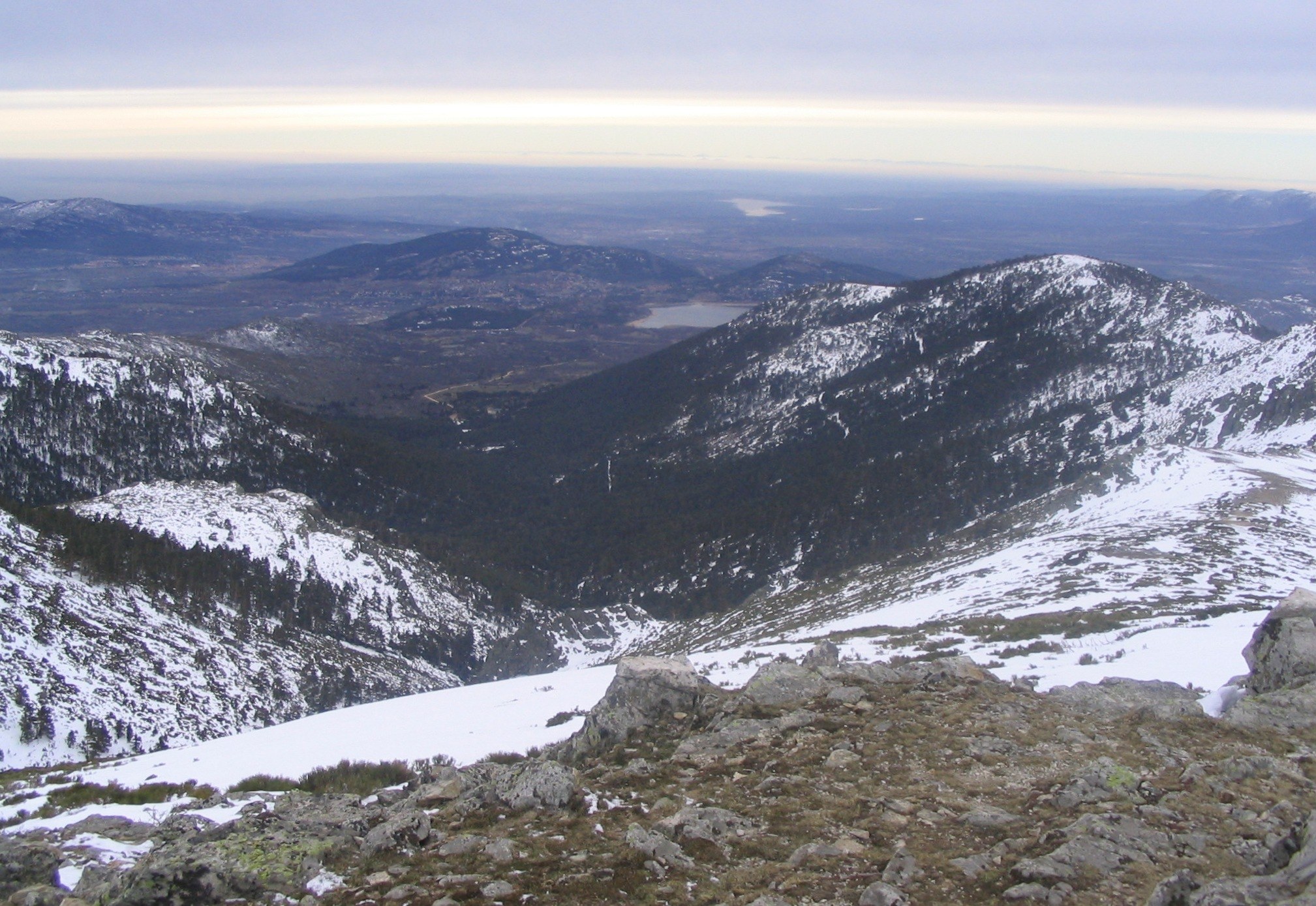 Vista del valle de la Barranca (Comunidad de Madrid, España). La fotografía ha sido tomada desde la pista de hormigón que conduce a la Bola del Mundo (2.265 m) en un día de enero de 2006. El valle que se muestra, al que se accede a través del municipio de Navacerrada, tiene un espeso bosque de pino silvestre, una pista forestal que conduce al Puerto de Navacerrada, varios senderos que ascienden a picos próximos como La Maliciosa (2.227 m), un hotel y un área recreativa. En la zona más alejada del paisaje que se ve en la imagen se ven los embalses de Navacerrada (el más cercano) y el de Valmayor, más grande que el primero.